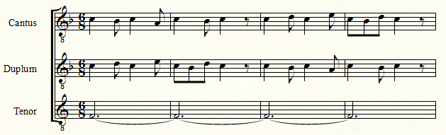 Clausula "Benedicamus Domino" (12th c.) Demonstration of voice exchange (polyphonic technique)